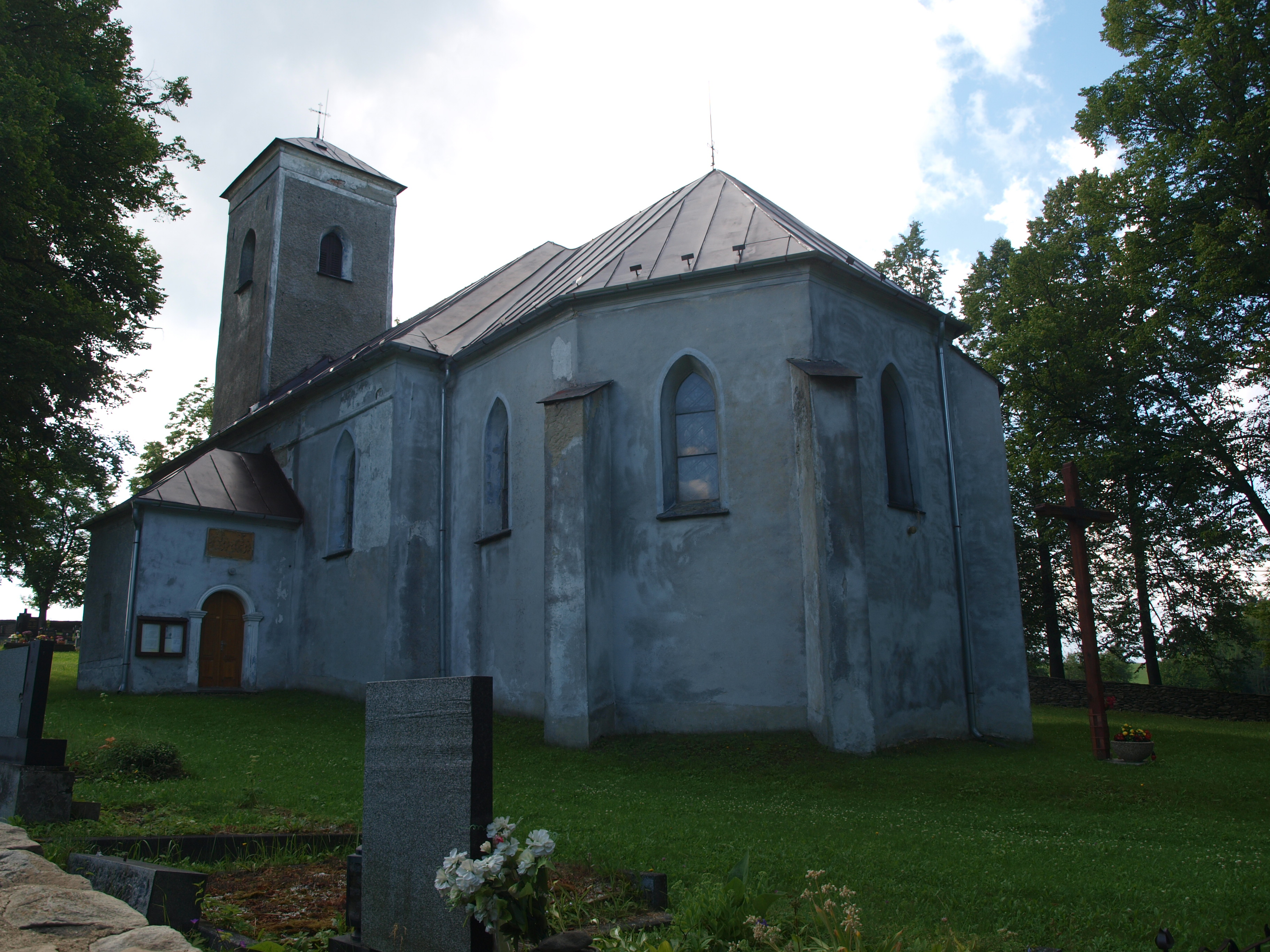 Kostel svatého Jiří v Lomnici (okr. Bruntál)